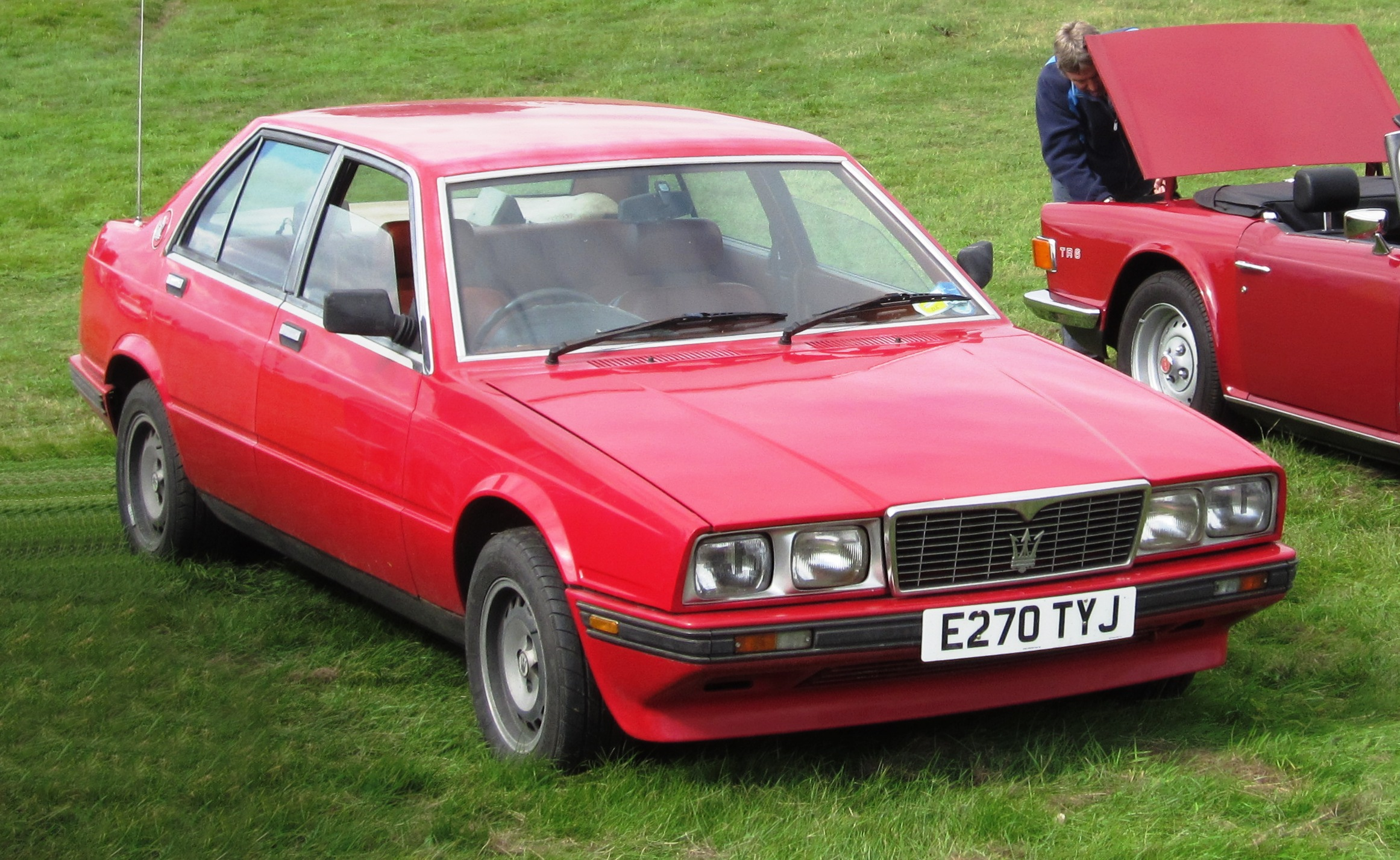 Maserati Biturbo 420 de '88